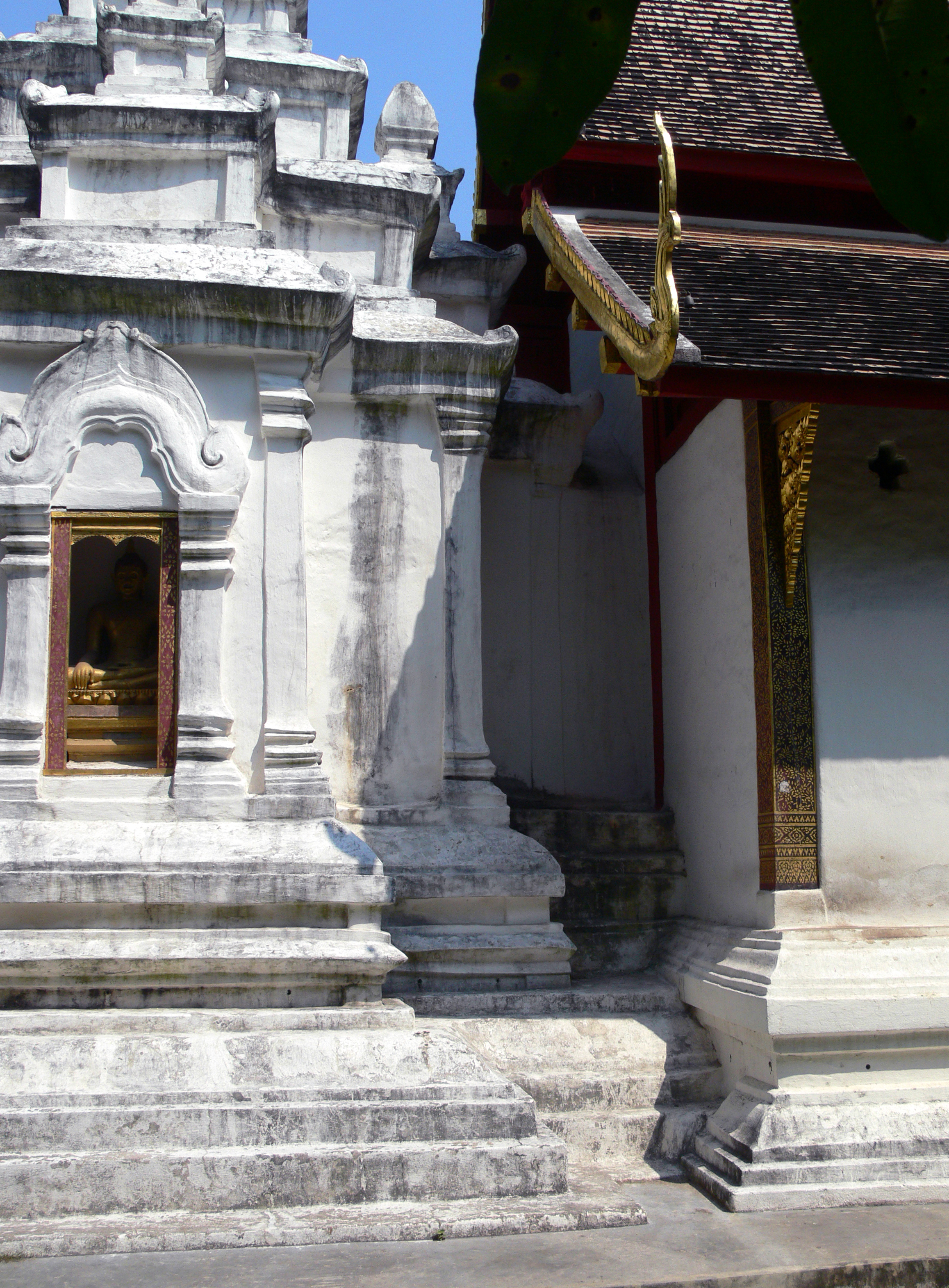 Chedi en Wihan beide gedeeltelijk in beeld, met in het centrum het verbindende tunneltje.